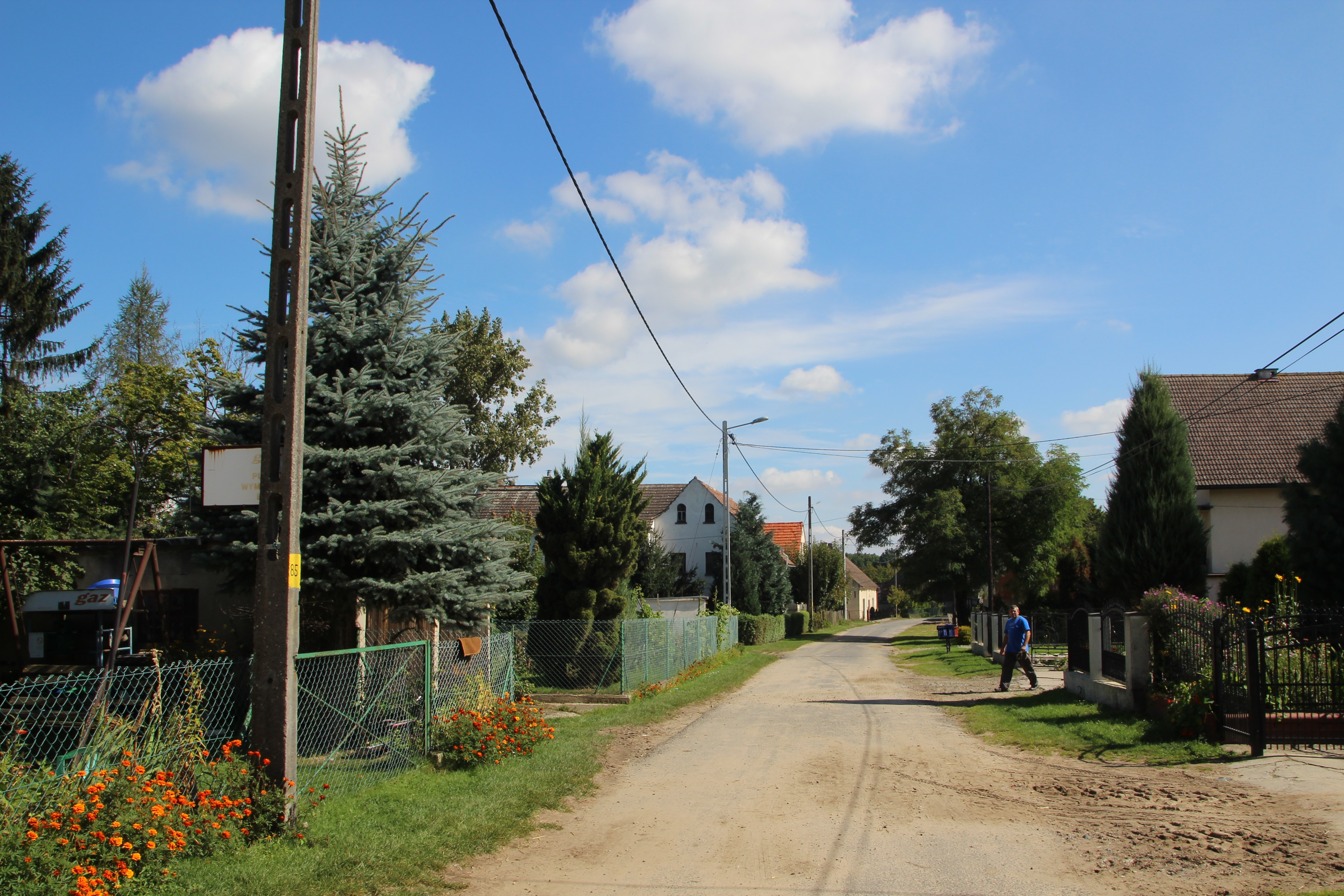 Wilemowice – wieś w Polsce położona w województwie opolskim, w powiecie nyskim, w gminie Kamiennik.